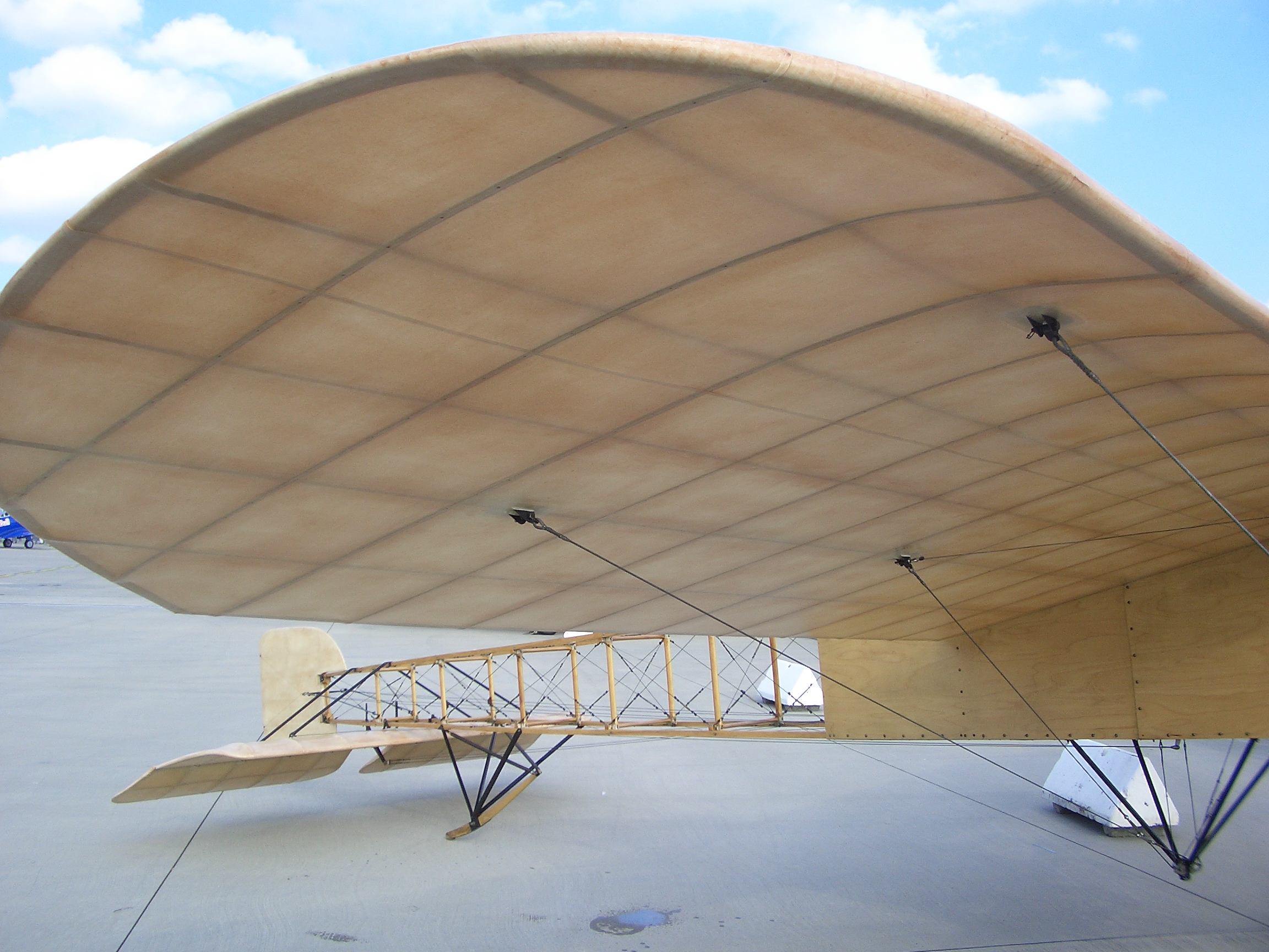 Blériot_XI_Wing detail